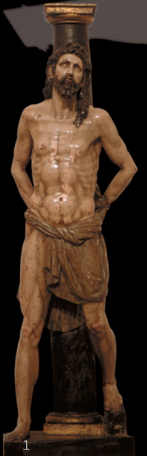 Azpeitiko kristo saminetan